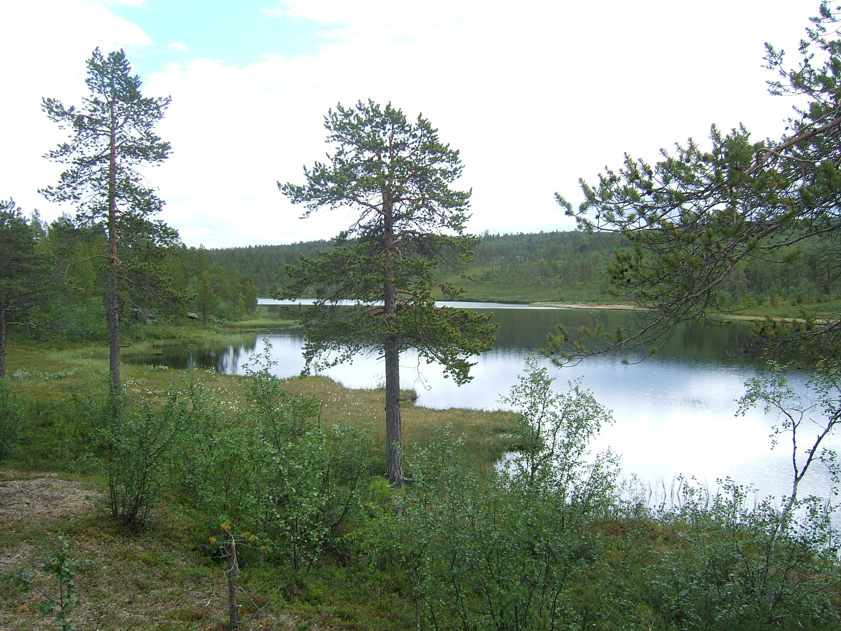 Madiijavri